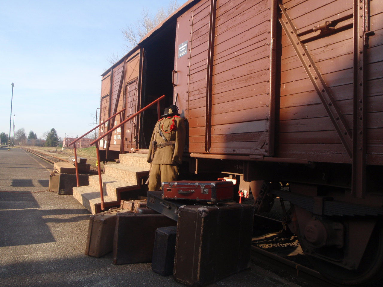 Holocaust-Ausstellung in Güns am März 2011, Bahnhof Güns